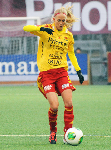 a_31_3700